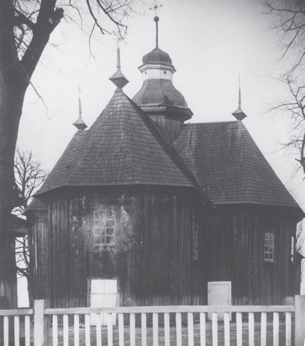 Беларуская (тарашкевіца): Галоўчыцы (Hałoŭčycy). Царква